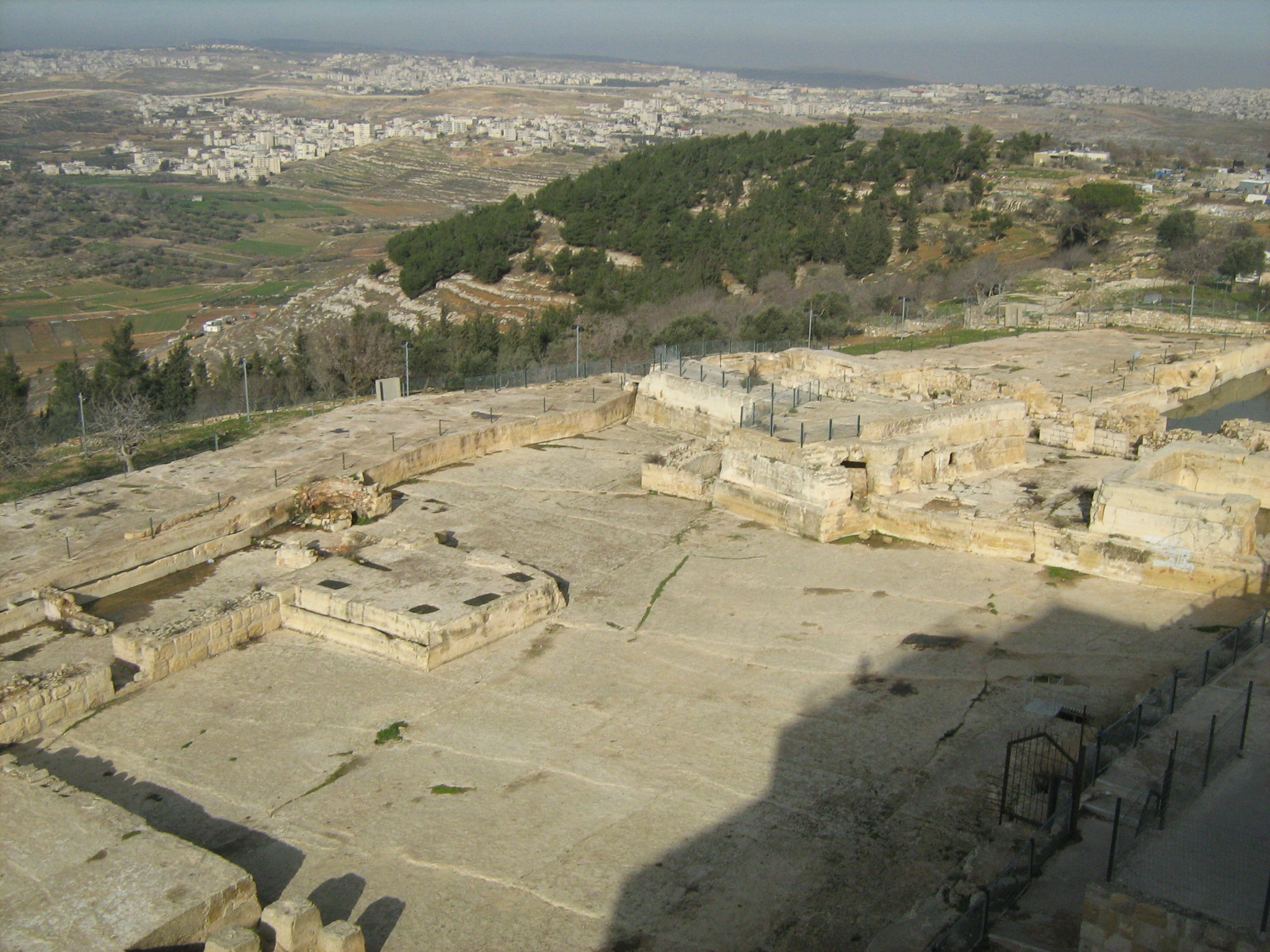 נבי סמואל